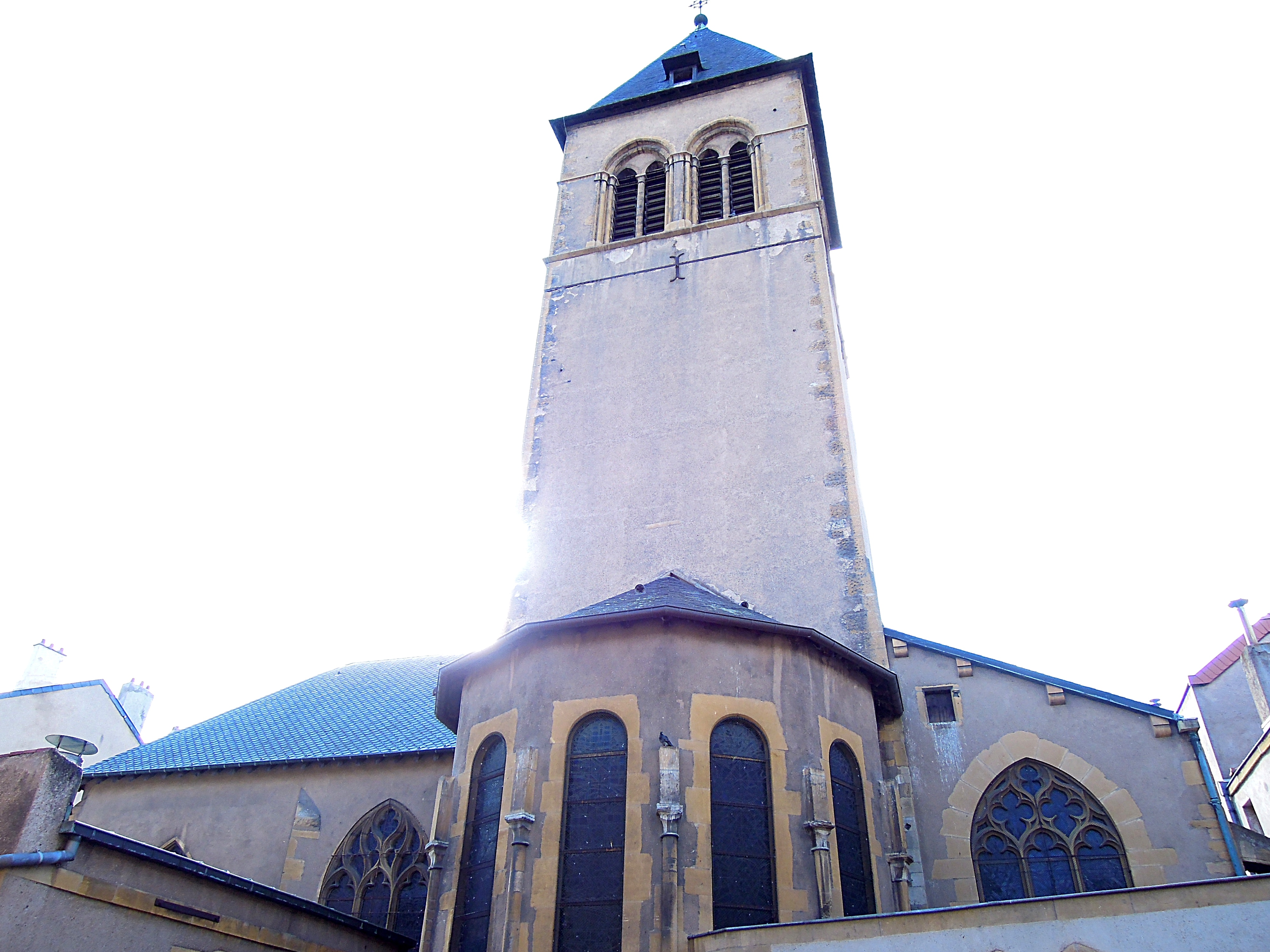 Chœur et clocher (12ème). Vue de la rue de la Baue .